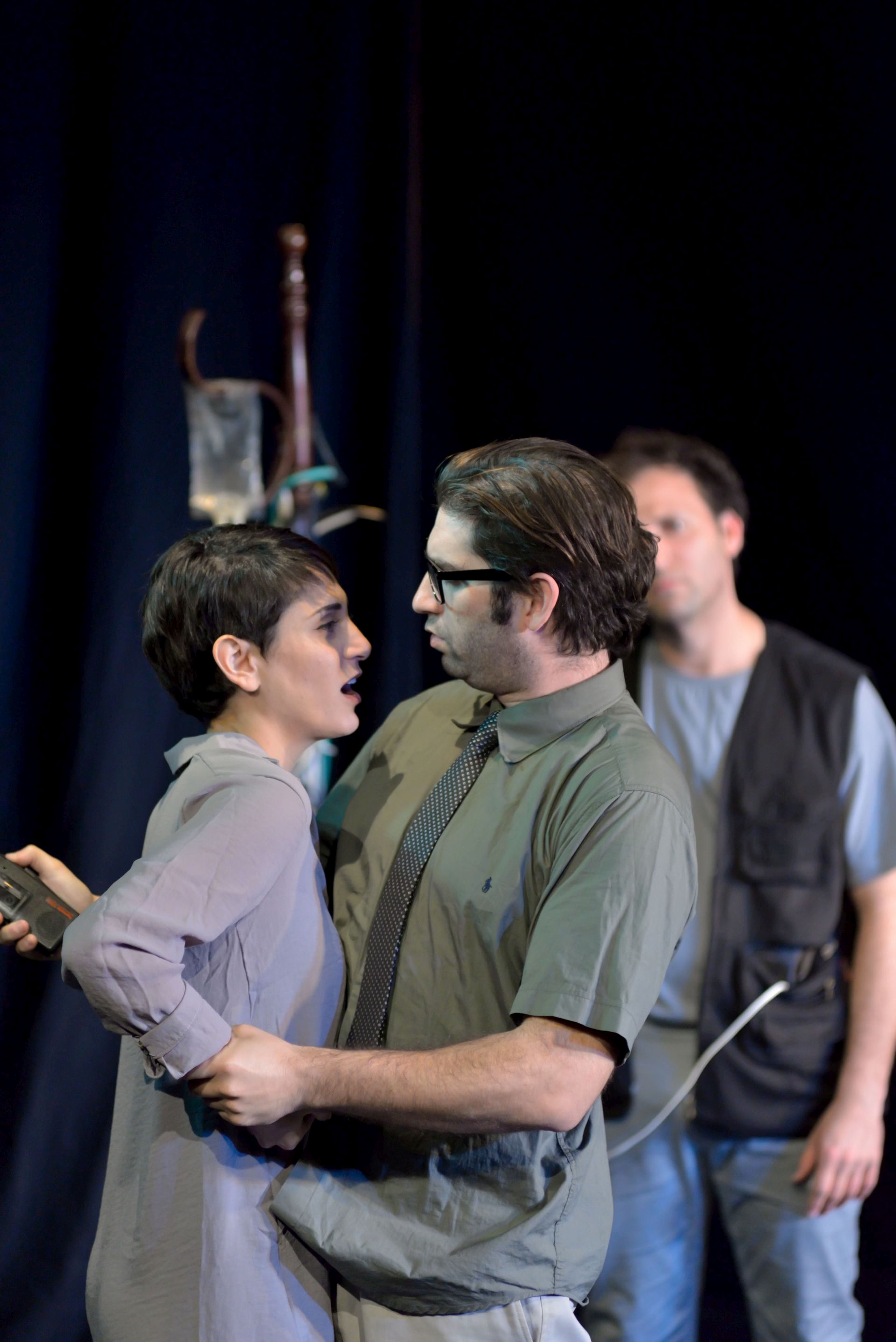 אושר בית הלחמי, יואל ברמן וטל גינת מתוך ההצגה צמחים מטפסים